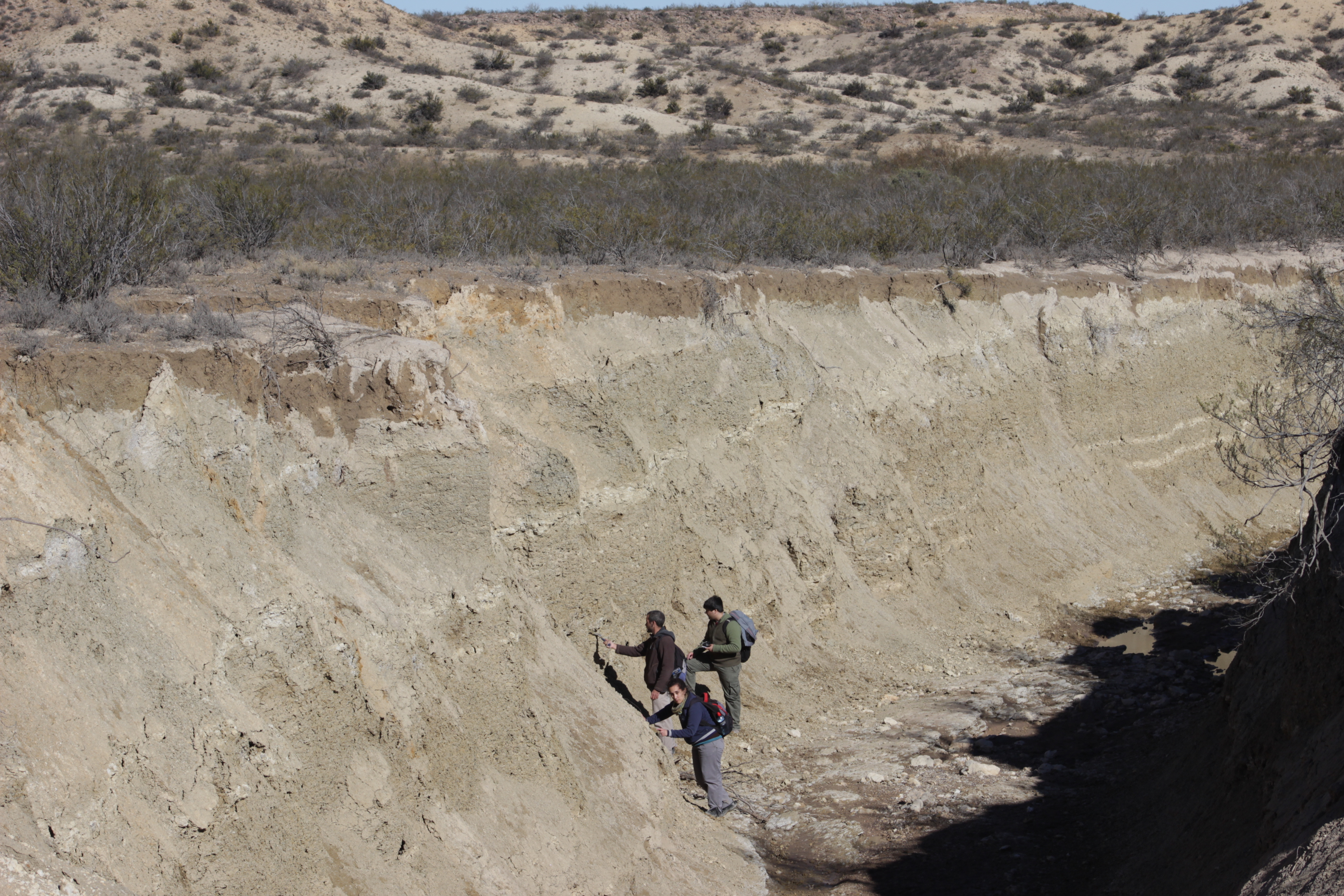 Formación Jagüel (Maastrichtiano a Daniano) subyacente a la Formación Roca en la localidad Cañadón Cholino, General Roca, Río Negro, Patagonia Argentina